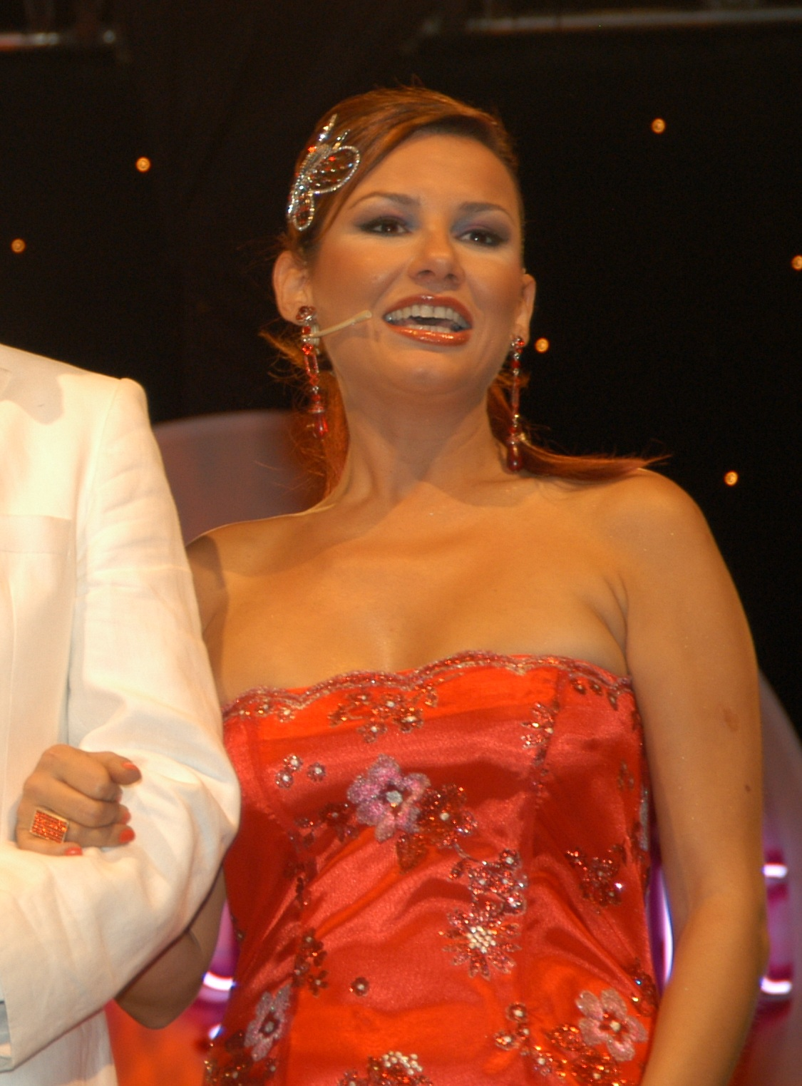 2004 Megahit-Uluslararası Akdeniz Şarkı Yarışması'ndan bir görünüm.